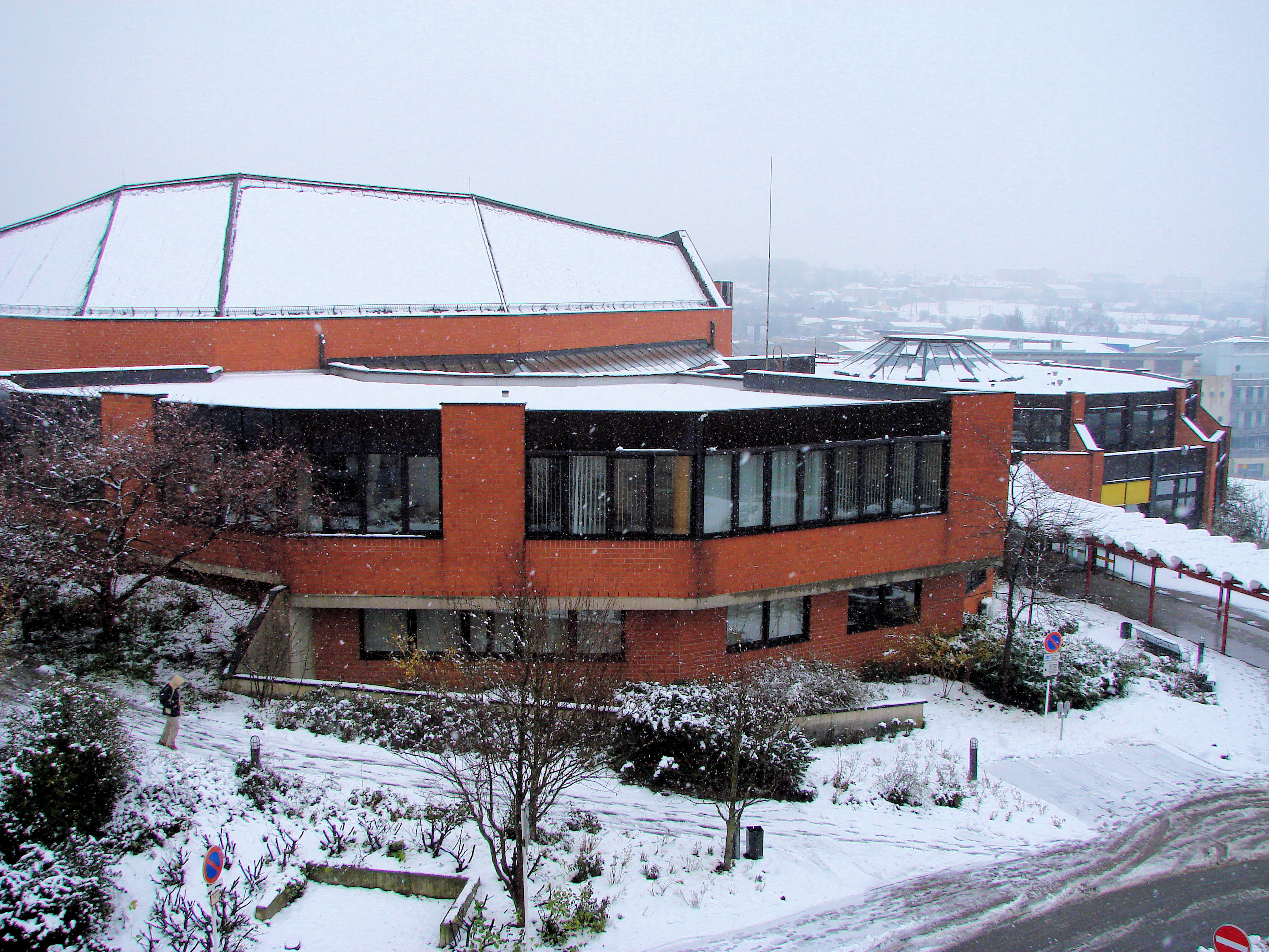 De Conservatoire Vun Lëtzebuerg am Schnéi